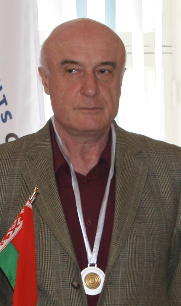 Anatoli Gantvarg, Euroopa võistkondlikud meistrivõistlused, Tallinn 2010